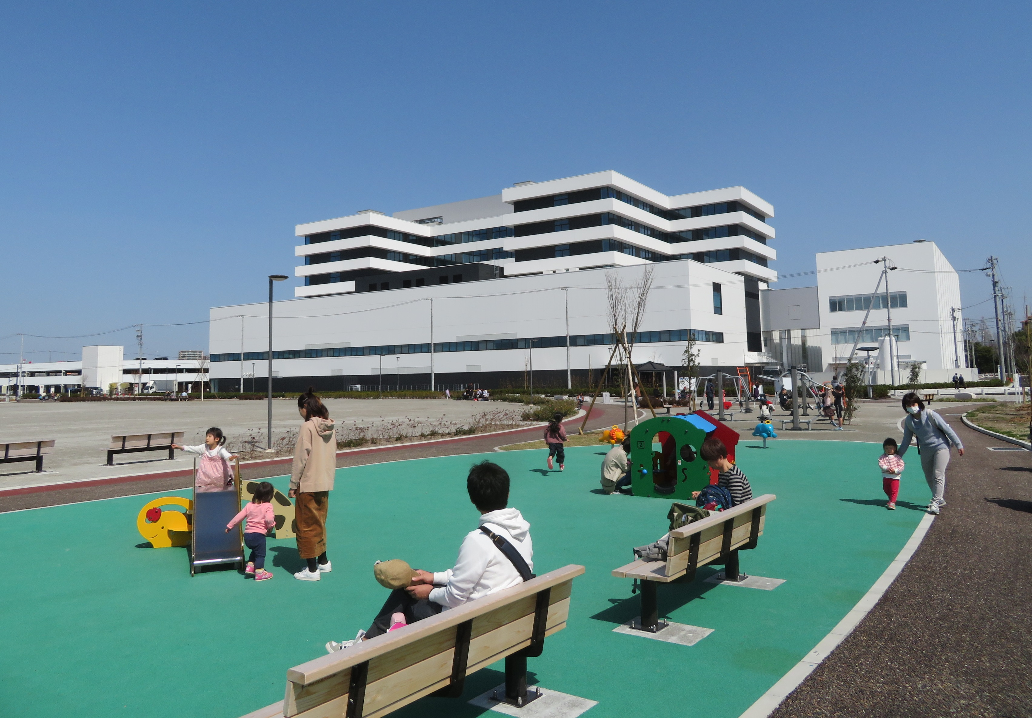 藤田医科大学岡崎医療センター、駅南中央公園（岡崎市針崎町）